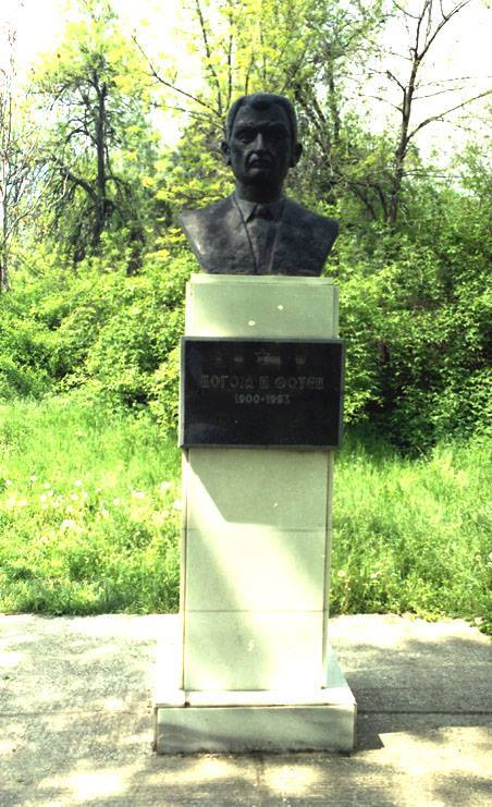 Биста на Богоја Фотев во Битола